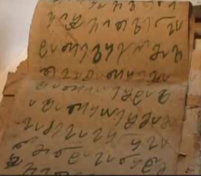 დედაბრული ხელის ნიმუში